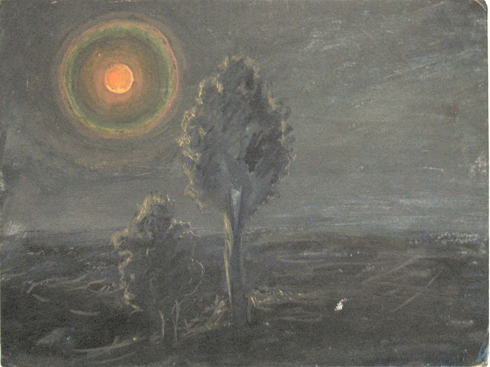 Tempera sur carton. 27,7 x 37,2 x 0,5 cm